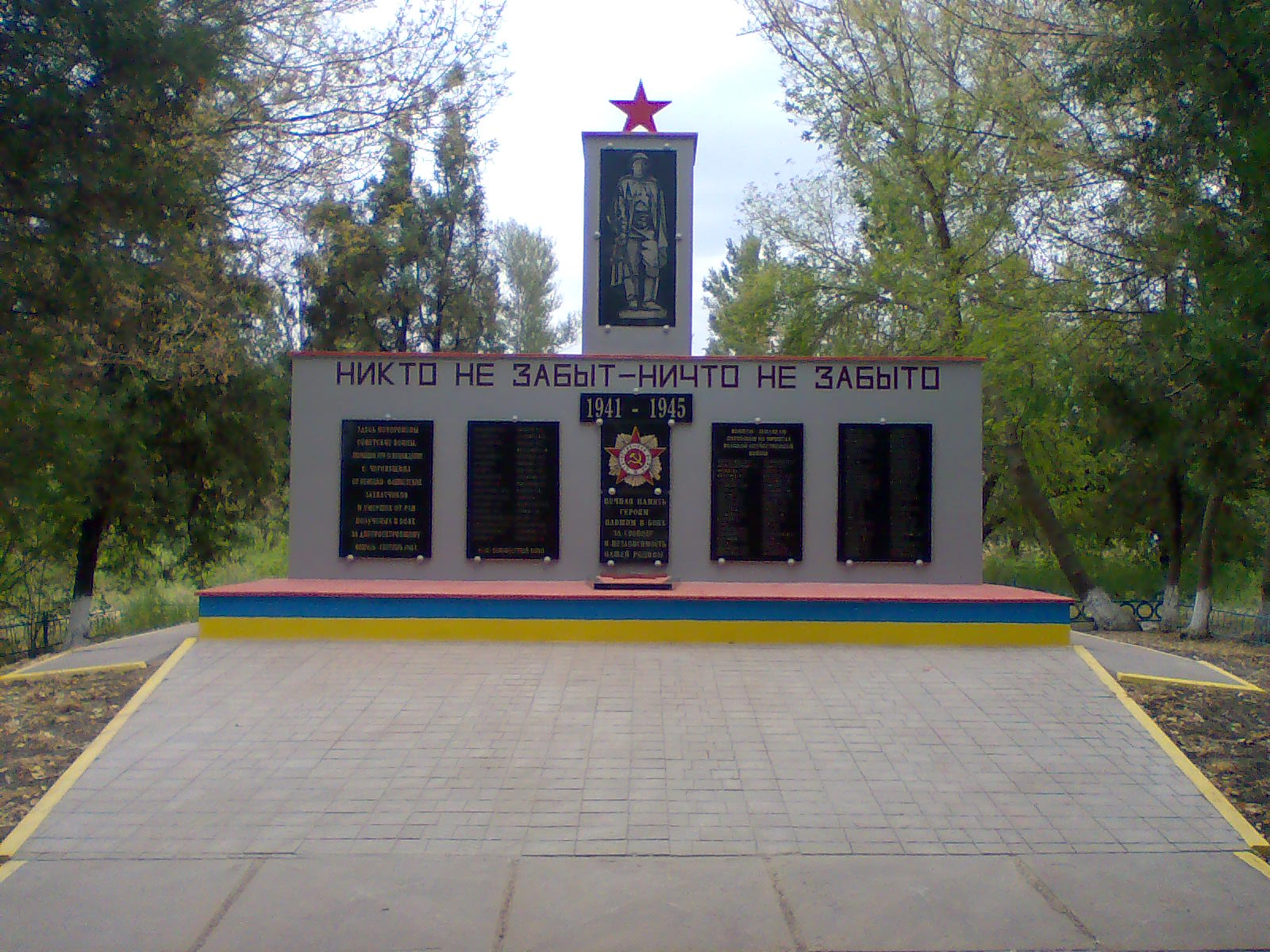 Братська могила радянських воїнів у с.Чернявщина